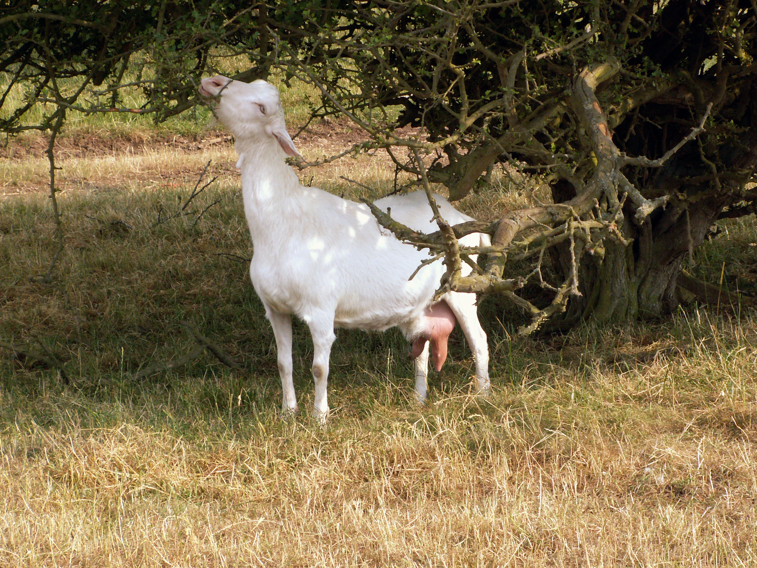 A Saanen doe browses.